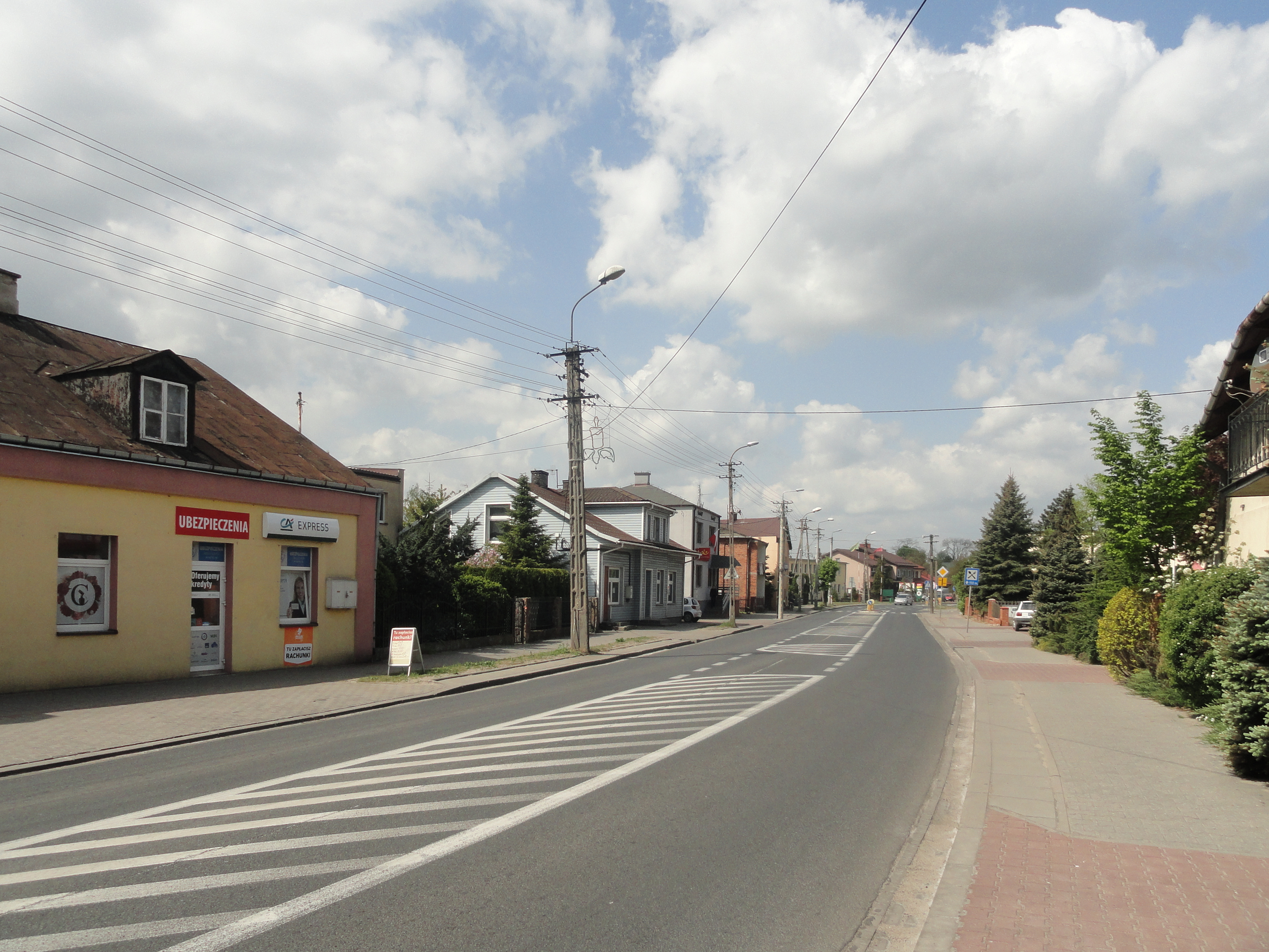 Ulica Warszawska - główna droga w Sannikach.